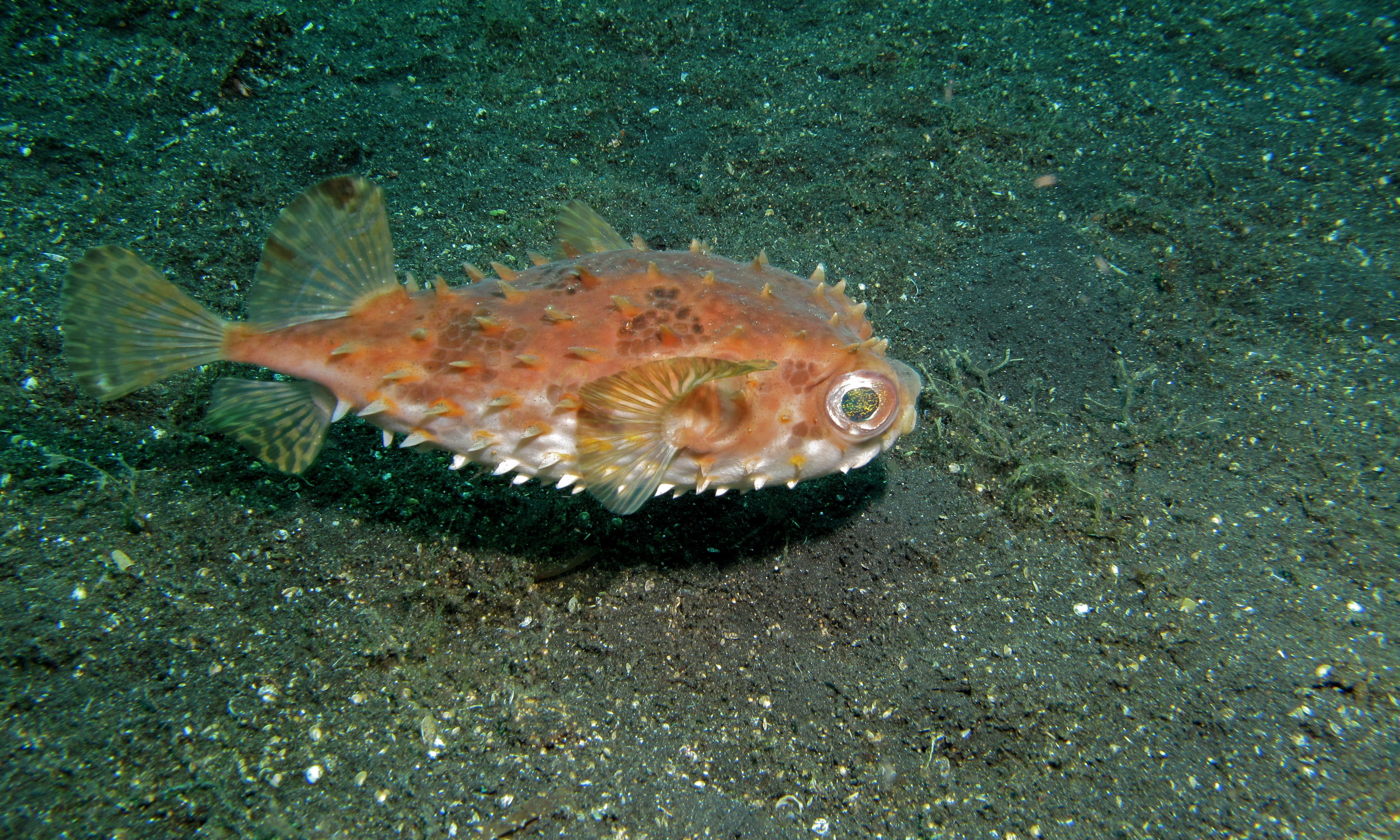 TK1, Lembeh Strait, Sulawesi, INDONESIA